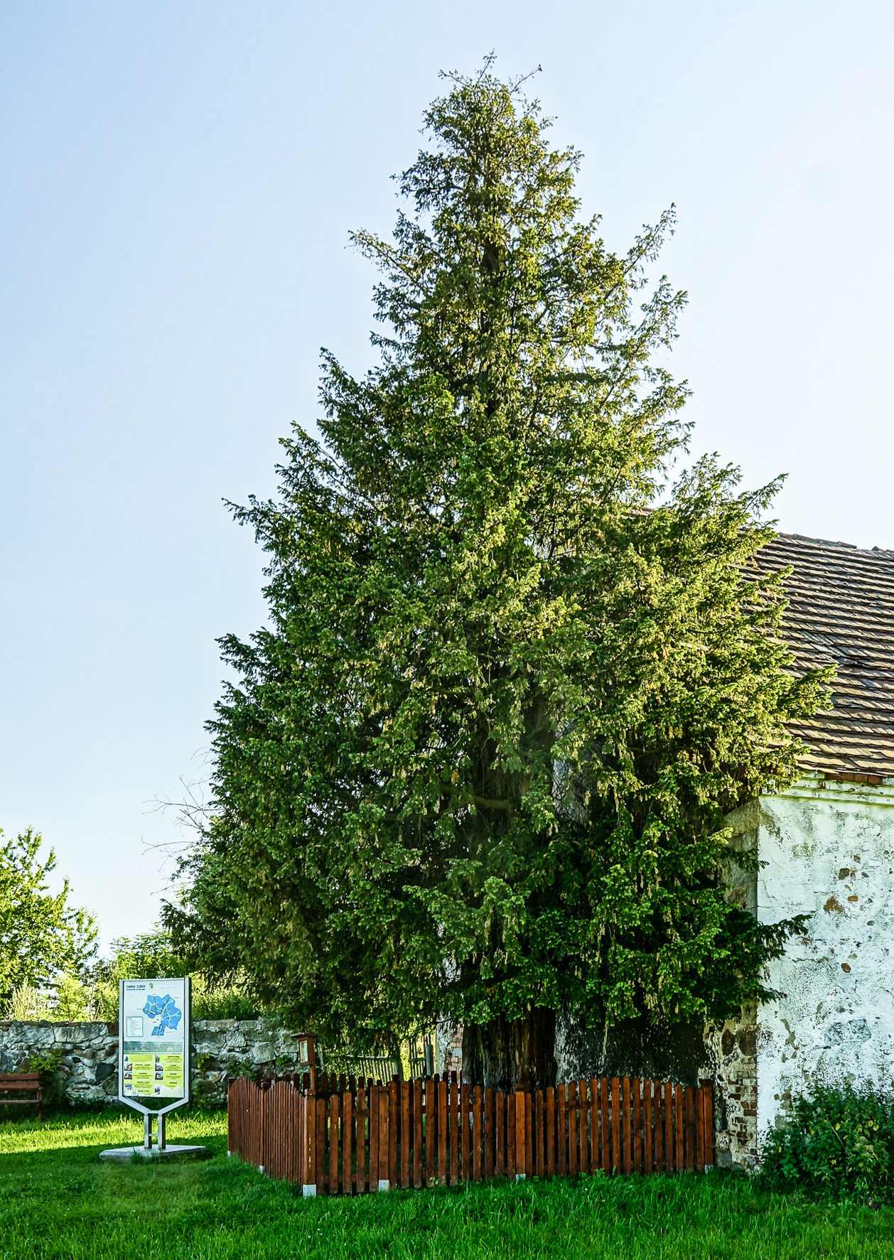 Cis pospolity w Henrykowie Lubańskim - najstarsze drzewo w Polsce (wiek szacowany na 1263 lata).